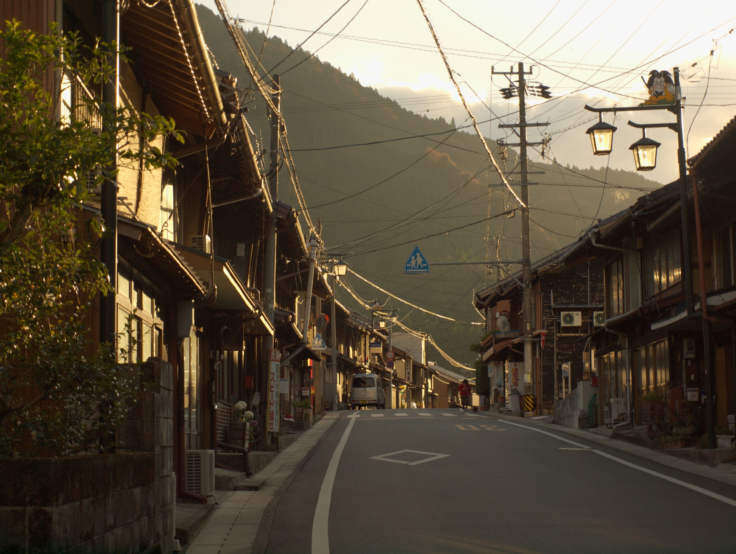 佐久間町浦川の街並み